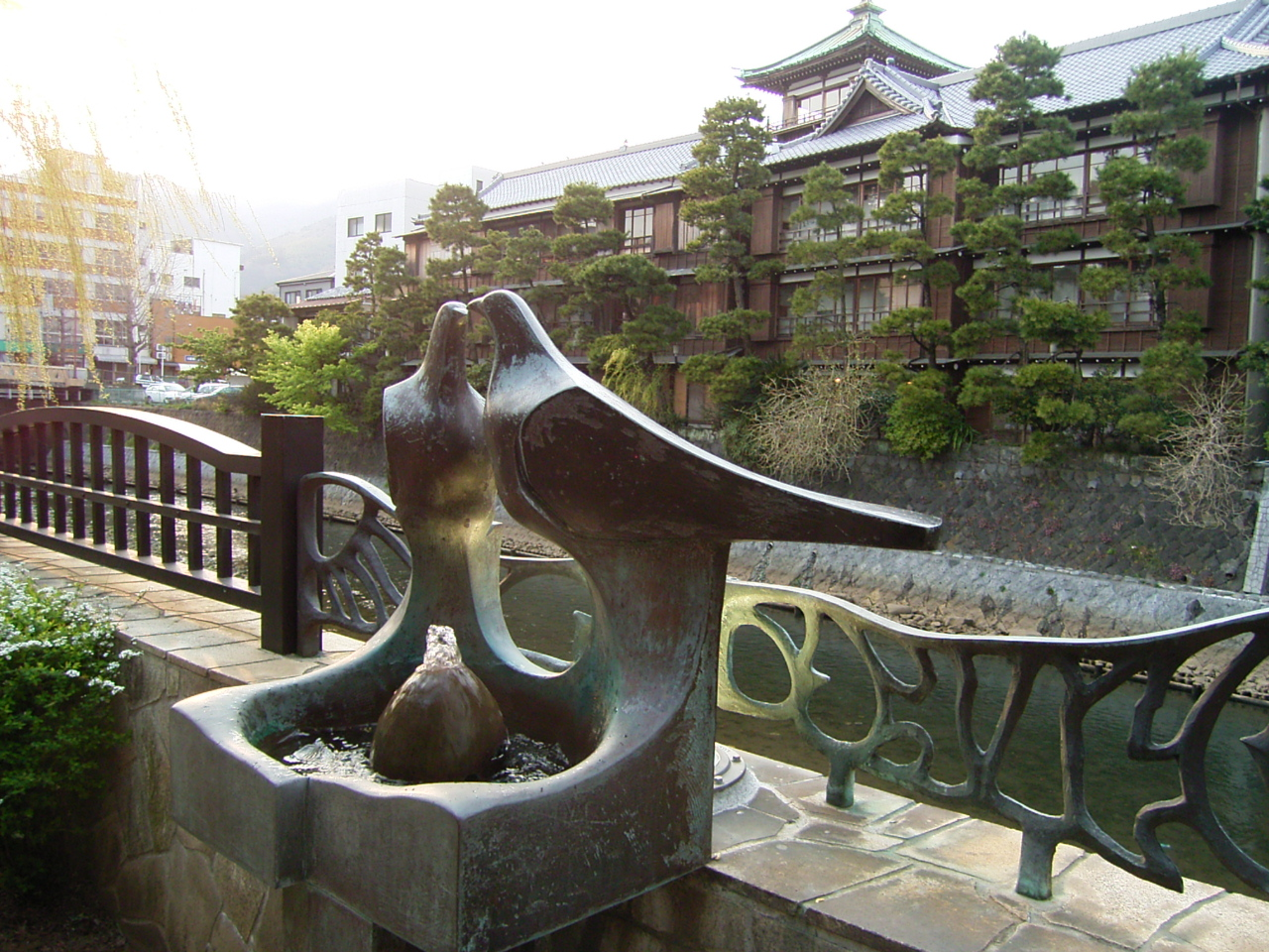 伊東市松川遊歩道